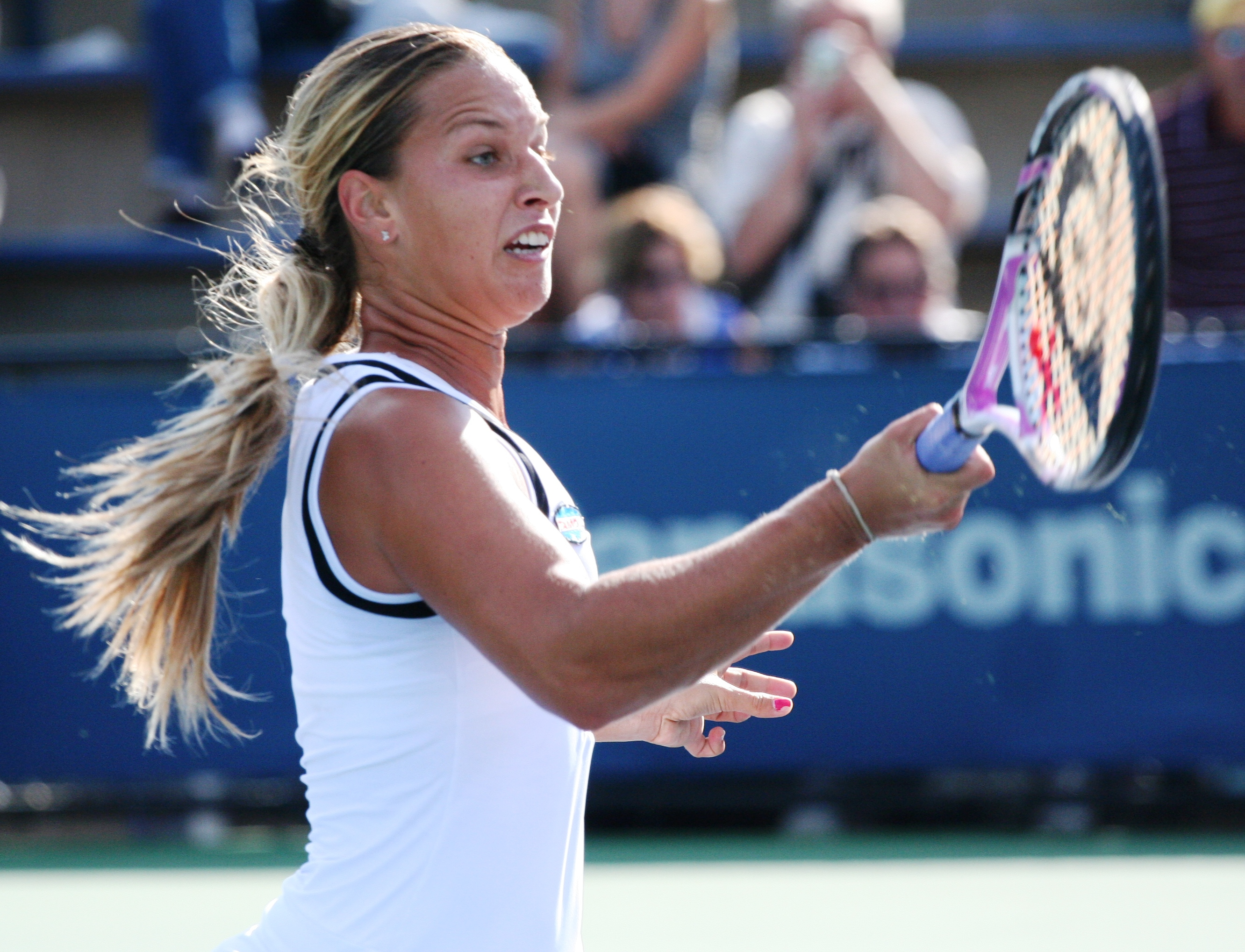 Dominika Cibulková at the 2010 U.S. Open Saturday, Sept. 4, 2010